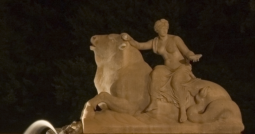 Teil des Wittelsbacher Brunnen am Lenbachplatz/München